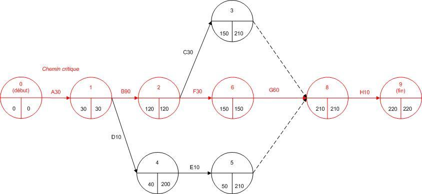 Auteur : Utilisateur:Gschmitt exemple diagramme PERT Sous gfdl Utilisateur:Gschmitt Janvier 2005